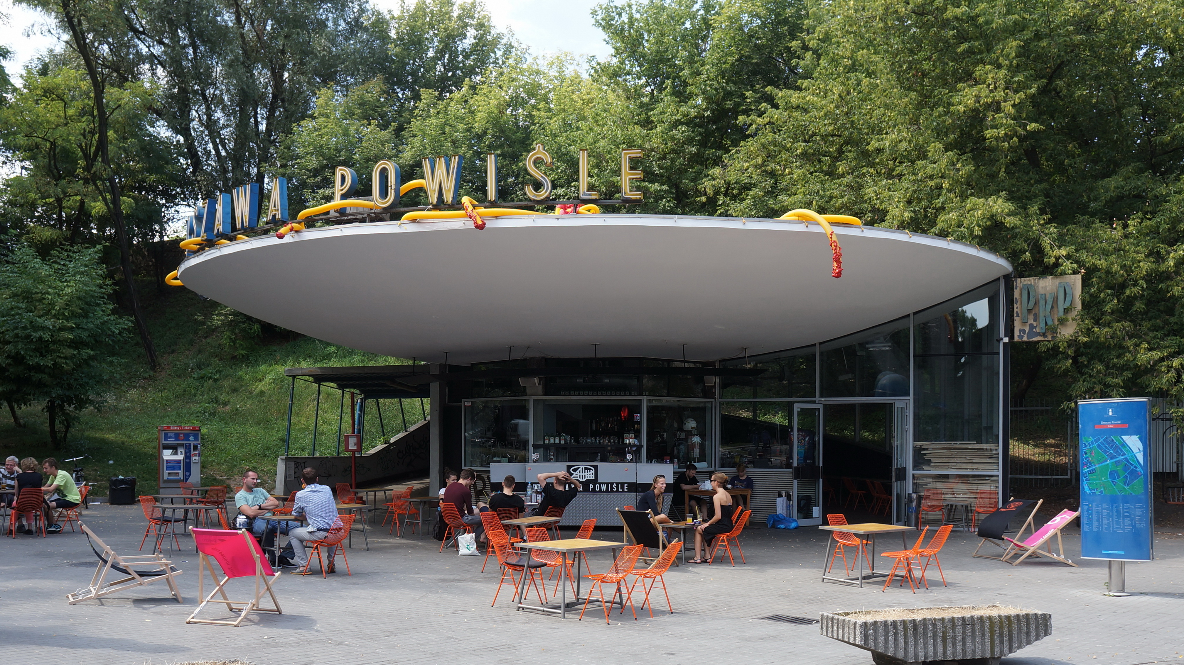 klubokawiarnia Powiśle działająca w pawilonie kas biletowych stacji PKP Warszawa Powiśle, zaprojektowanej przez Arseniusza Romanowicza